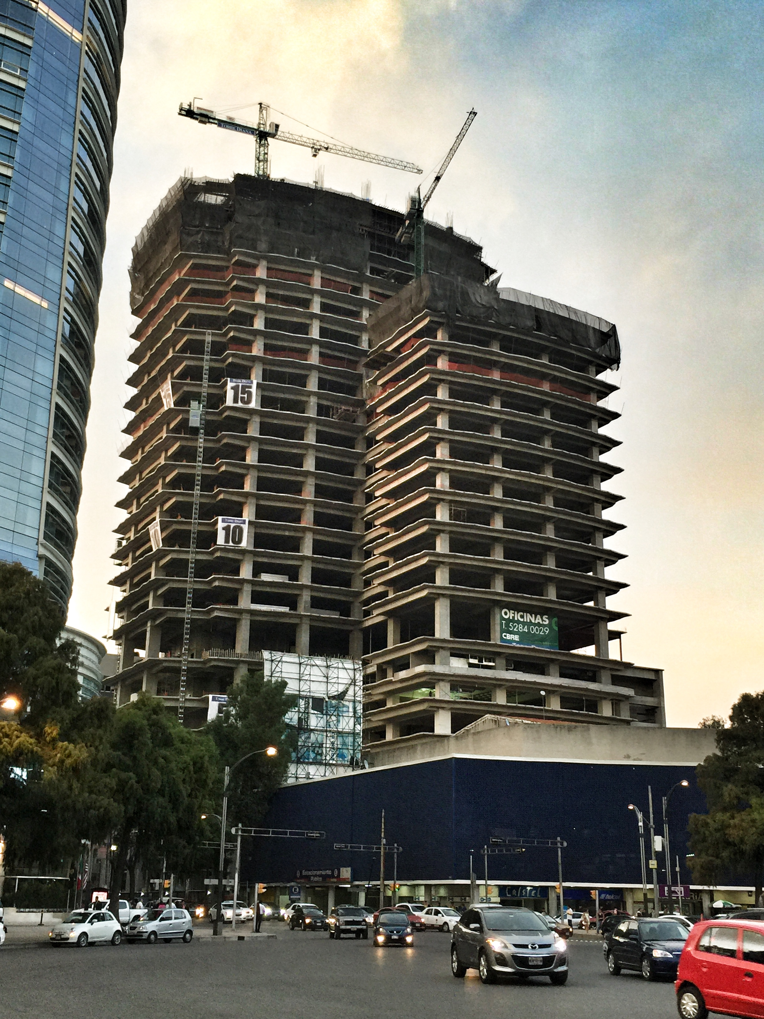 Torre Diana 2015-02-27